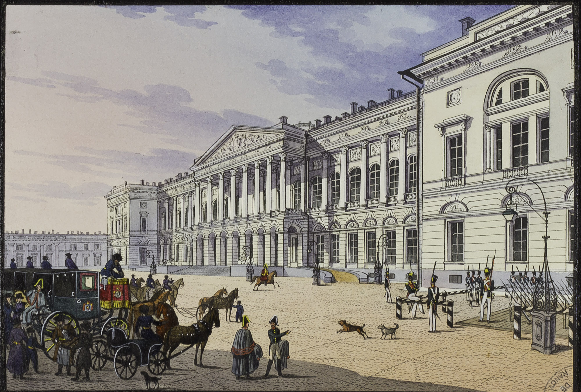 Enluminure de Ch. Beggrow, Saint Petersbourg.